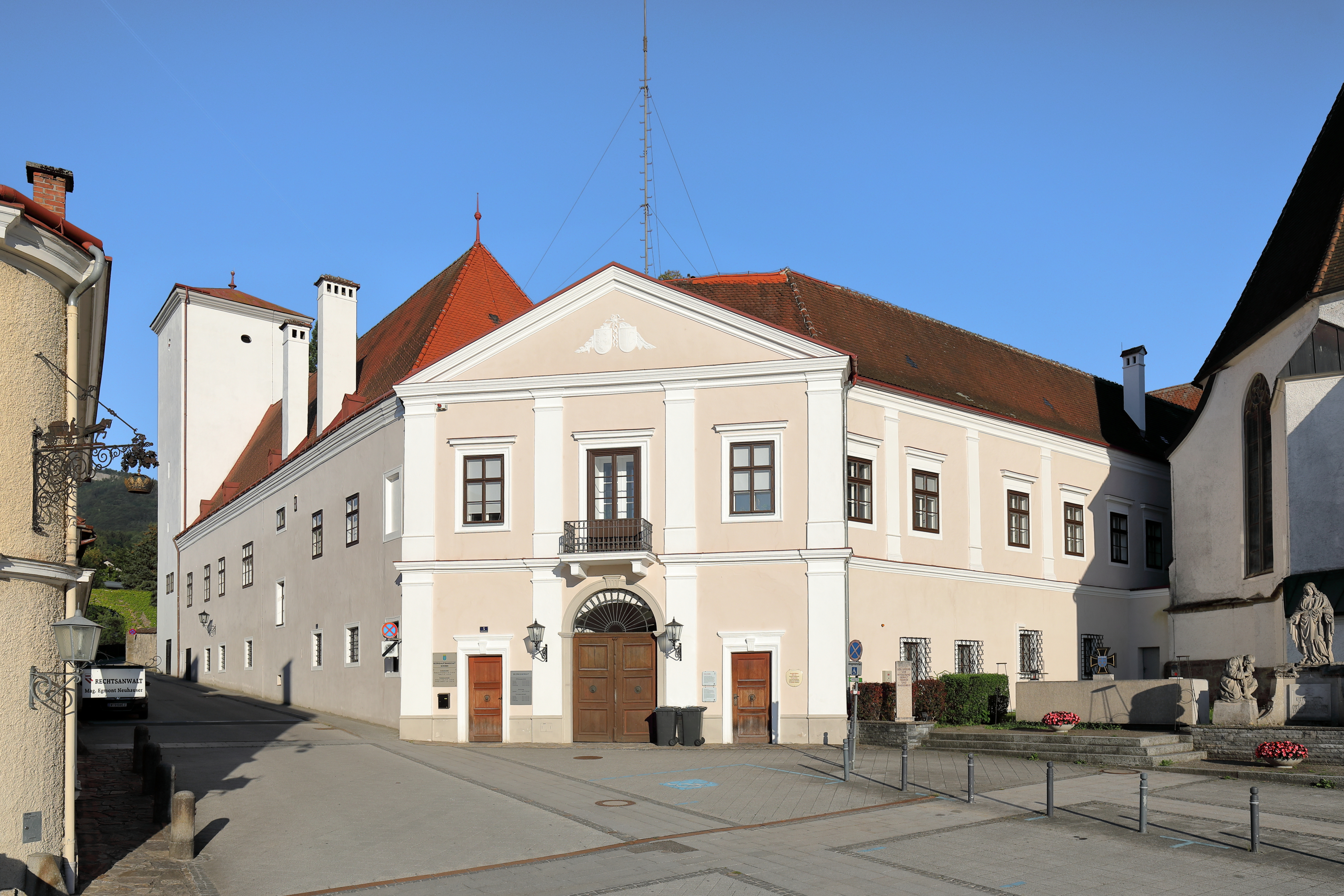 Nordwestansicht des Schlosses in der niederösterreichischen Stadtgemeinde Scheibbs. Im Kern mittelalterliche, um 1600 ausgebaute Vierflügelanlage um einen annähernd quadratischen Hof.